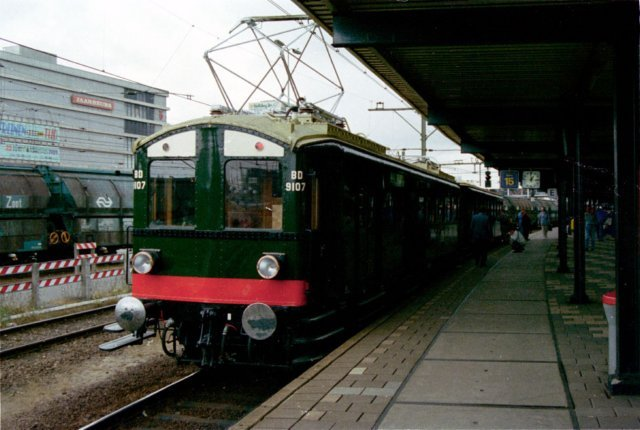 Het 'Blokkendoos'-museum treinstel, hier nog slechts bestaande uit een twee-wagenstel, gereed voor vertrek met de mBD9107 voorop te Utrecht CS tijdens de manifestatie "Treinen door de tijd".